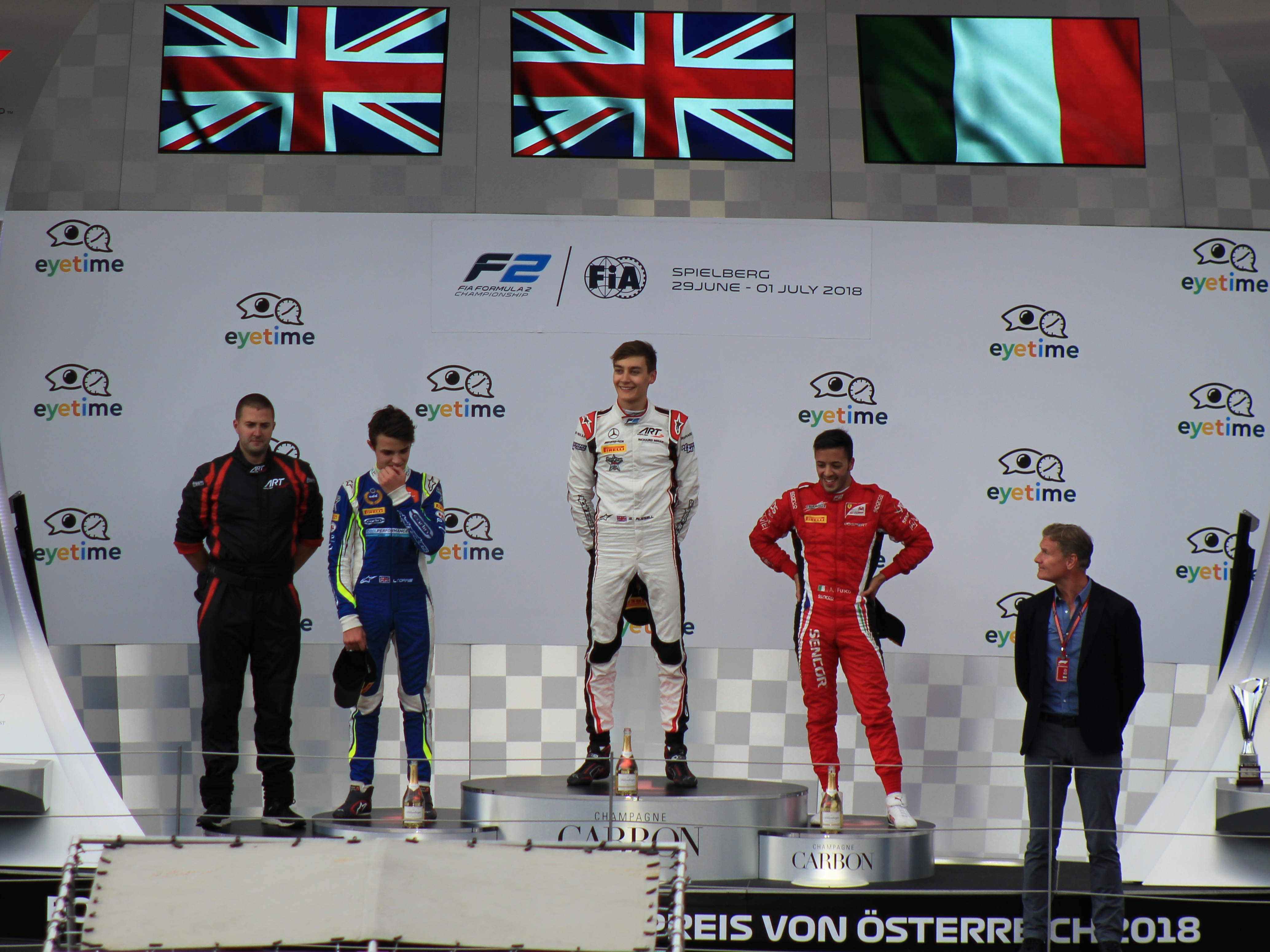 Nach dem ersten Rennen in Österreich 2018